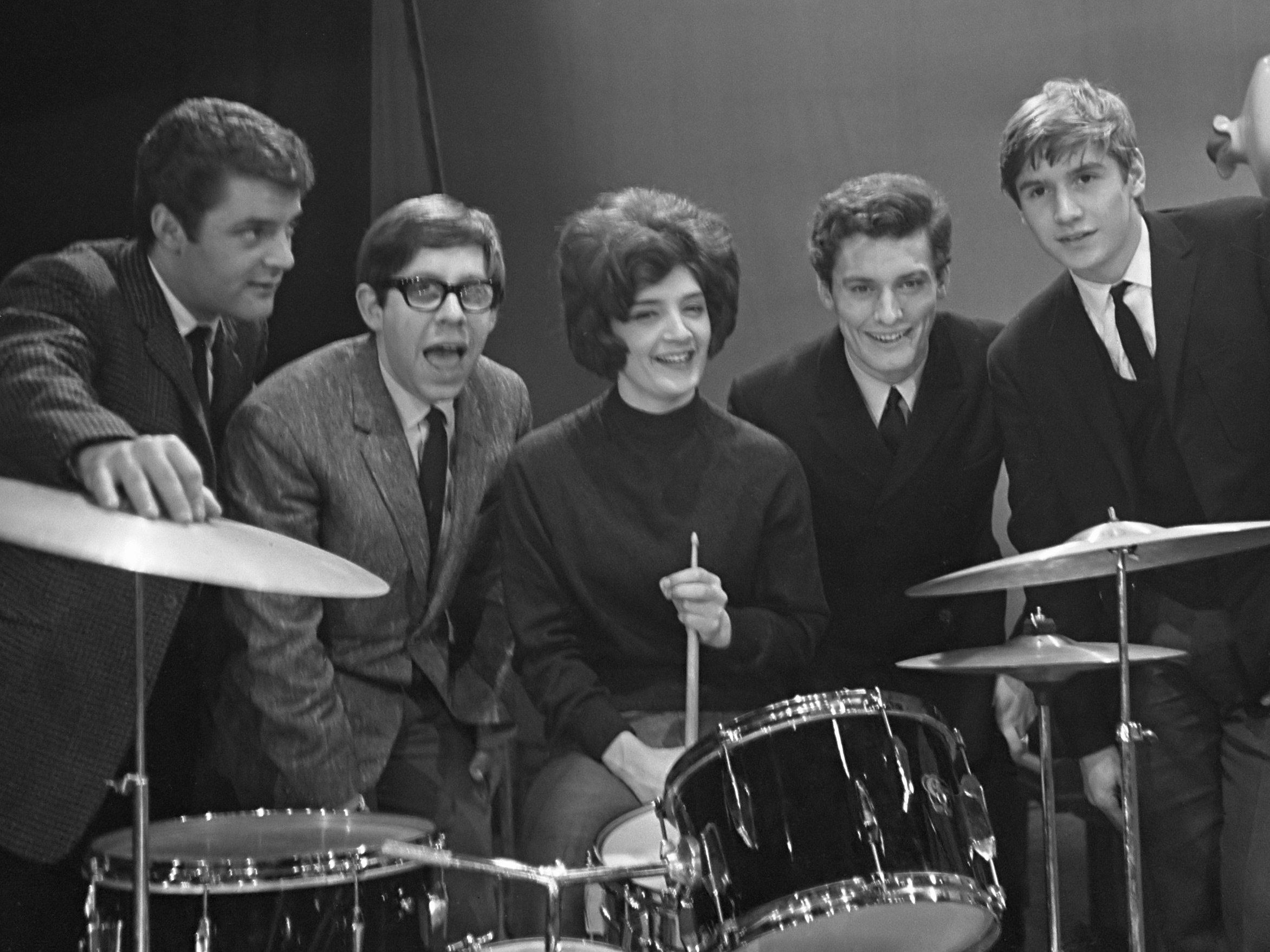 The Honey Combs (beatgroep) in Holland, tijdens repetitie in Grote Schouwburg Zuid te Rotterdam 10 december 1964